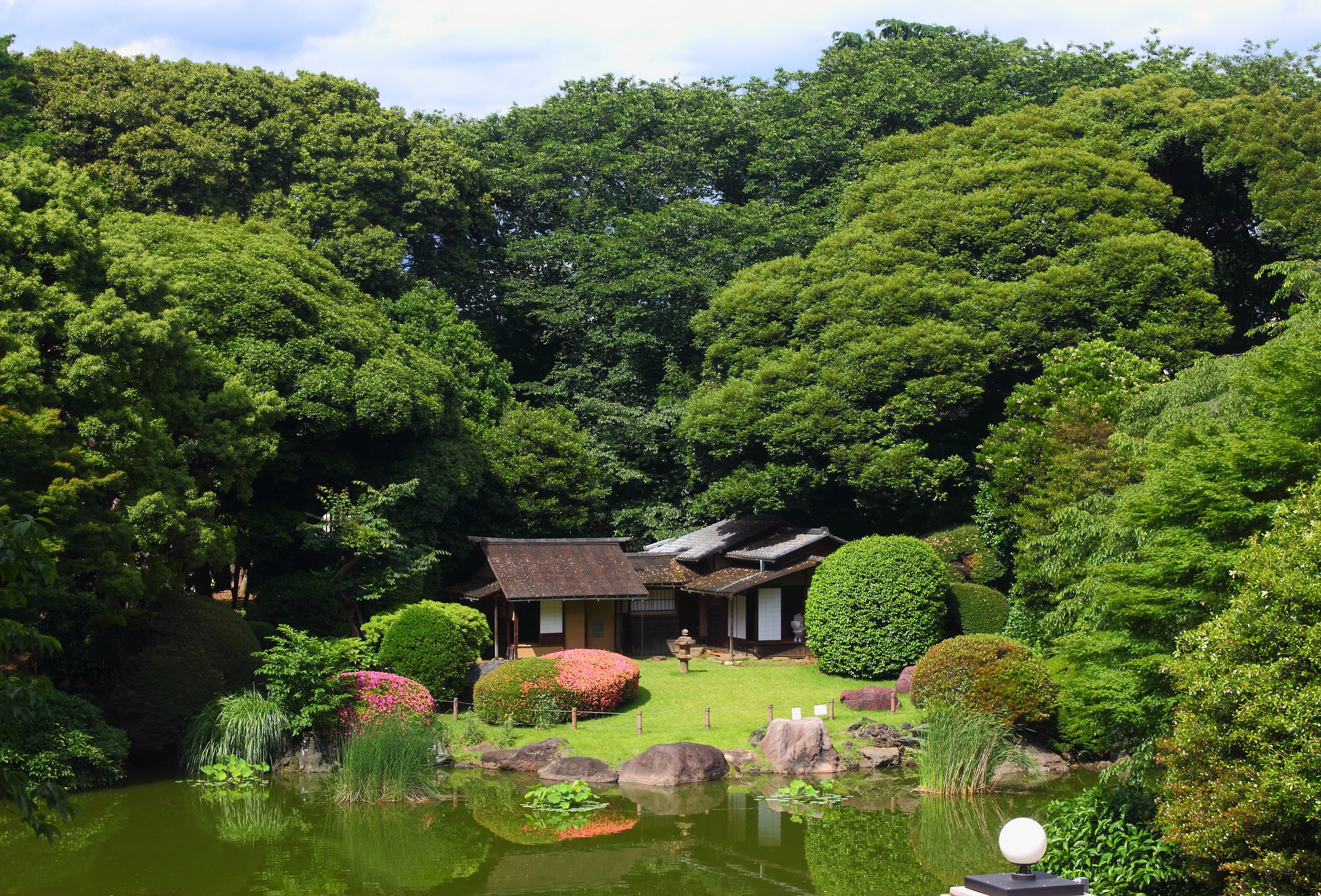 東京国立博物館の庭園（東京都台東区）